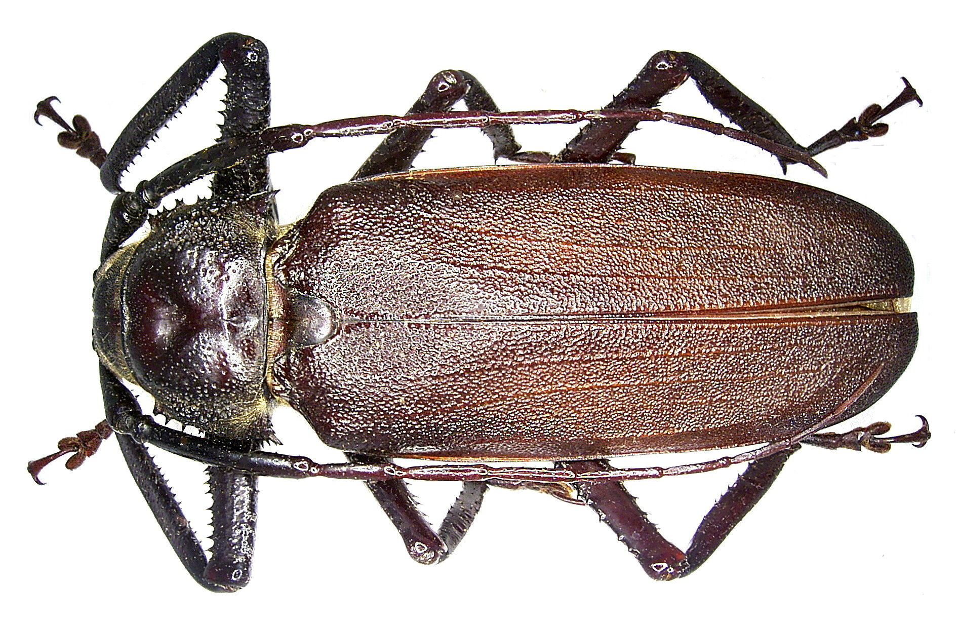 Familie: Cerambycidae Grösse: 77 mm Fundort: Kenia, Taita Hills, 900 m leg.det. U.Schmidt, 1991 Foto: U.Schmidt, 2005